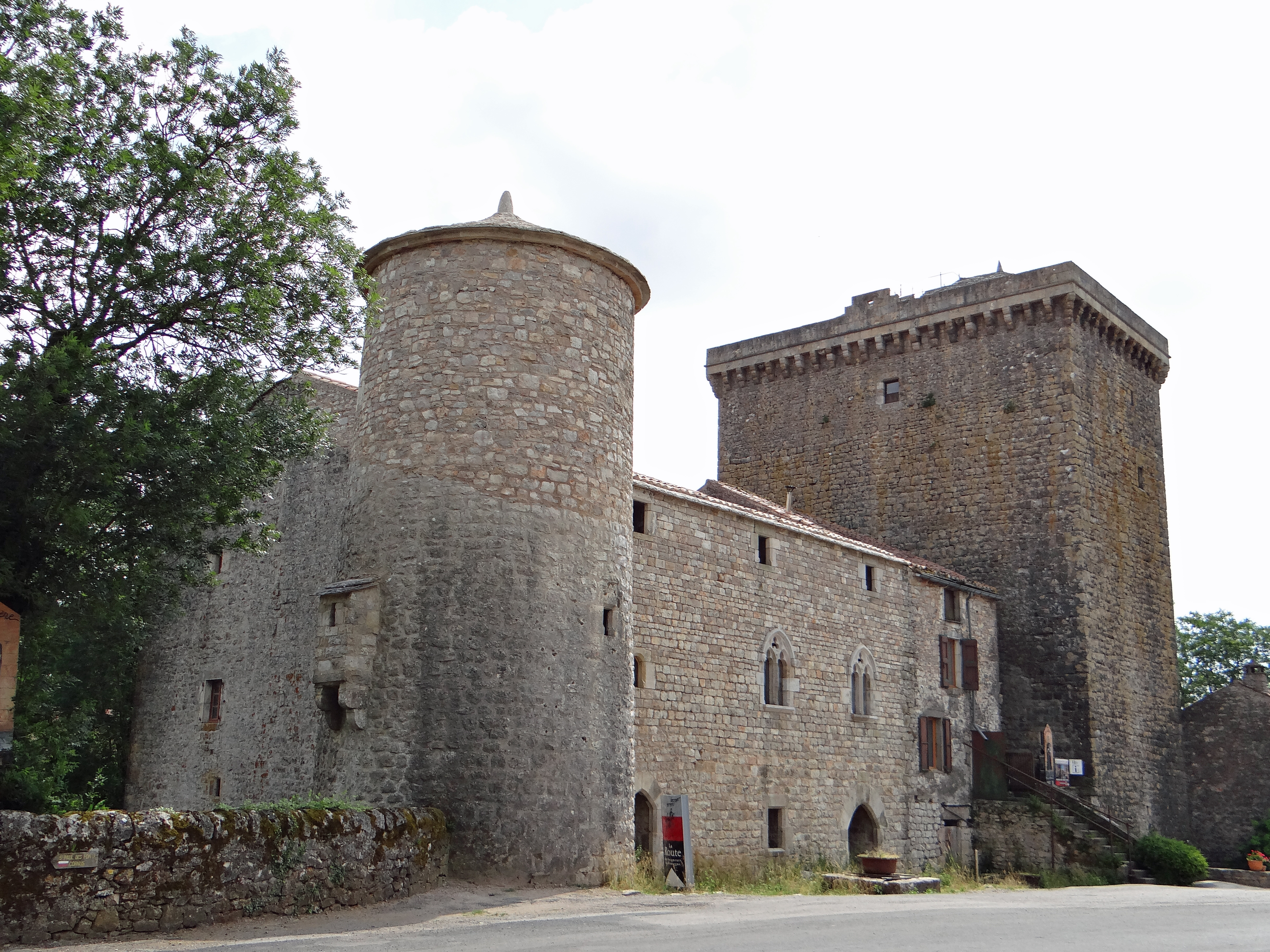 Tour du Viala-du-Pas-de-Jaux